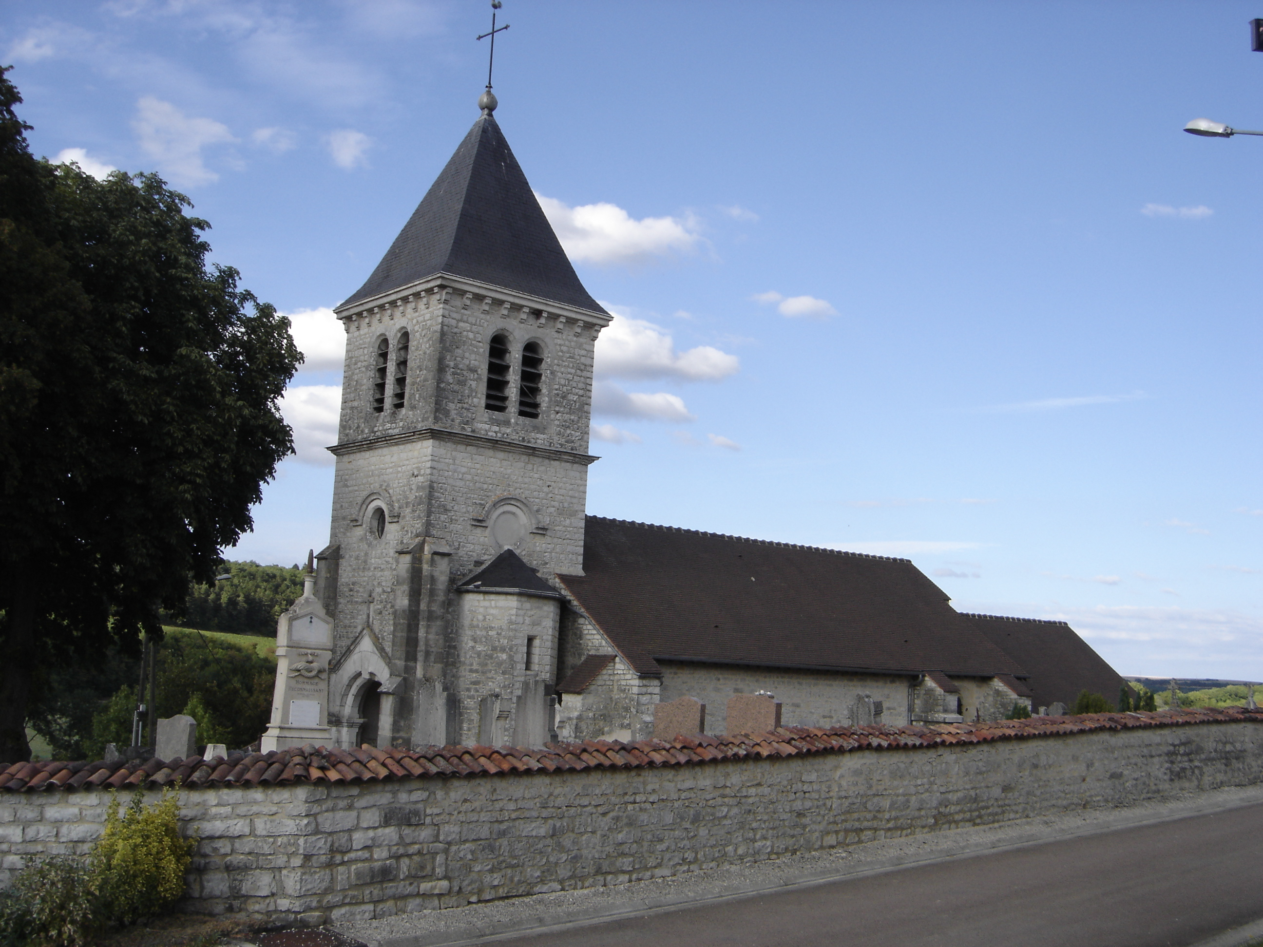 Eglise de Bertignolles - Aube - France